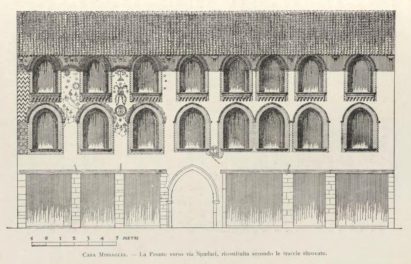 Fronte della Casa dei Missaglia in una ricostruzione del 1903 dell'architetto Moretti: prospetto su via Spadari, Milano.